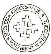 Pieczęć parafii Św. Tekli w Dobrzycy.